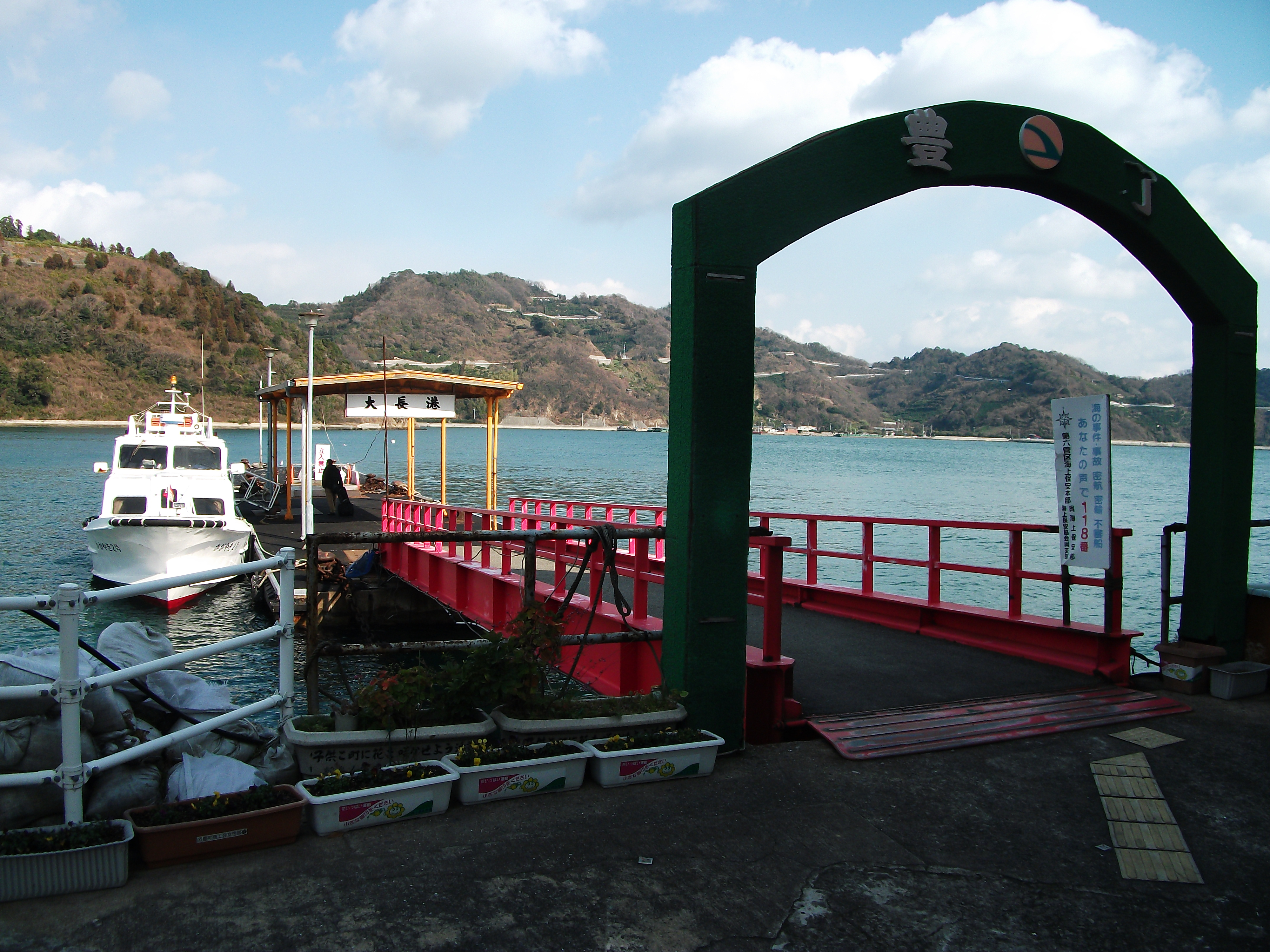 広島県呉市、大長港